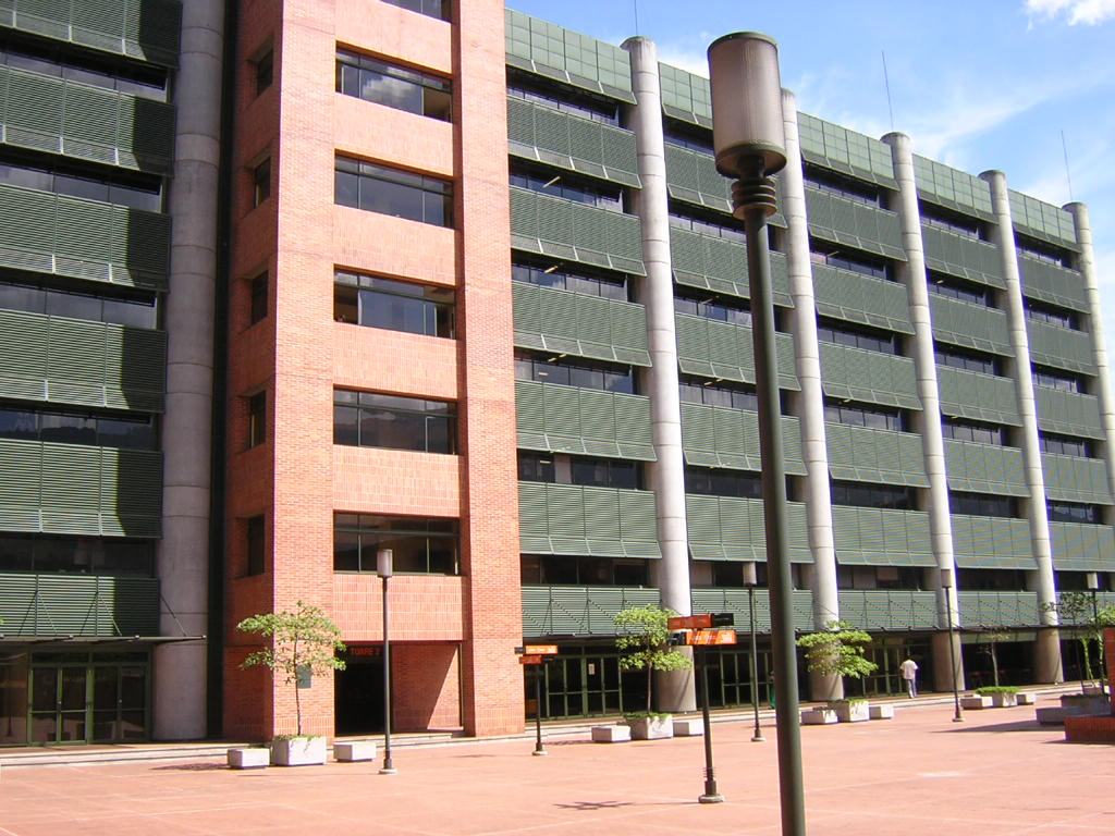 Sede de Investigación Universitaria -SIU- Área de la Salud, Universidad de Antioquia, Medellín, Colombia (esta foto la tome yo, y la libero al dominio público)